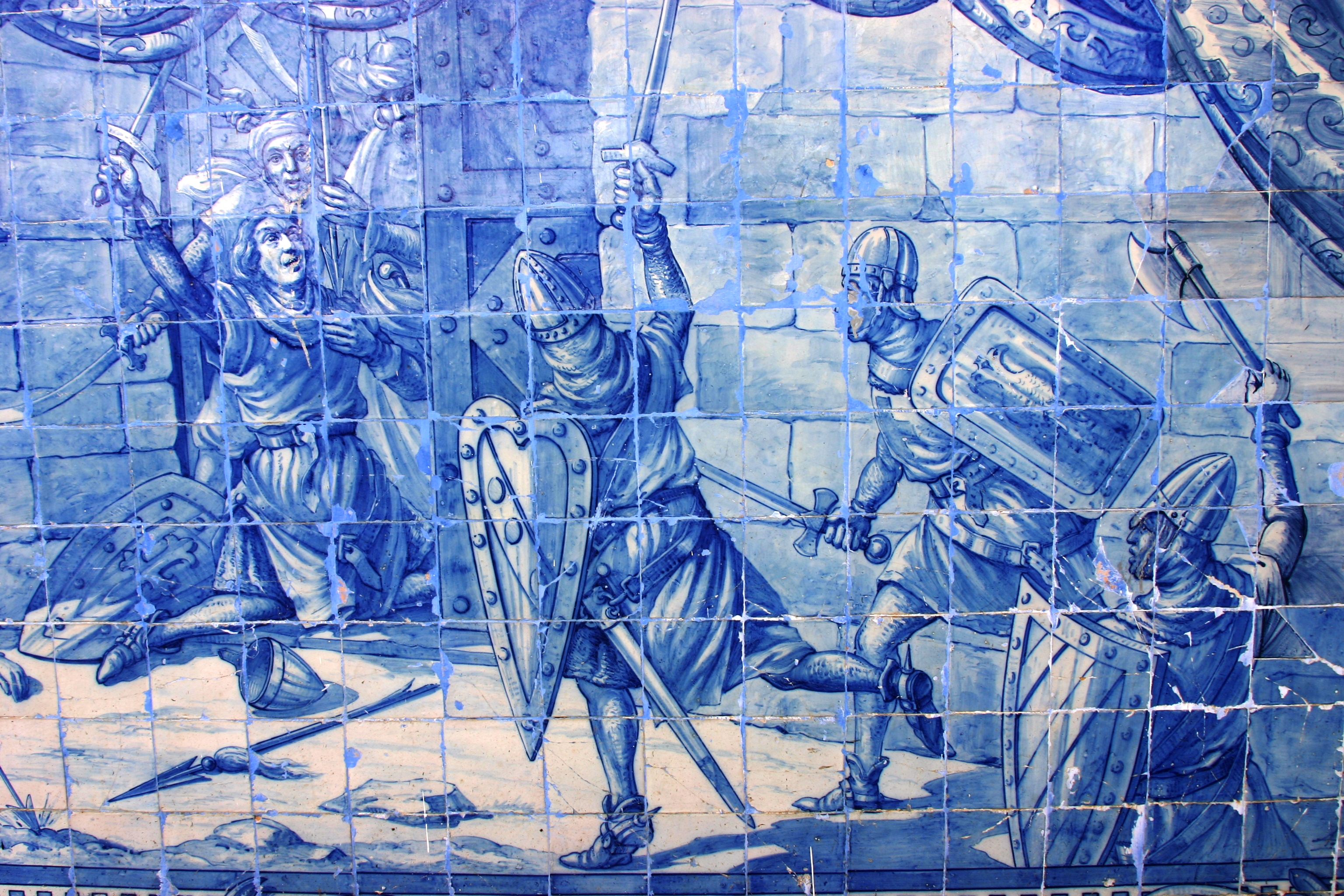 Azulejos sobre a conquista de Lisboa na Igreja de Santa Luzia